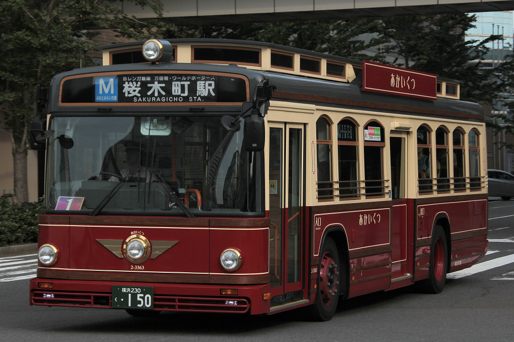 横浜市営バスあかいくつ 2-3363号車 日野・ブルーリボンII